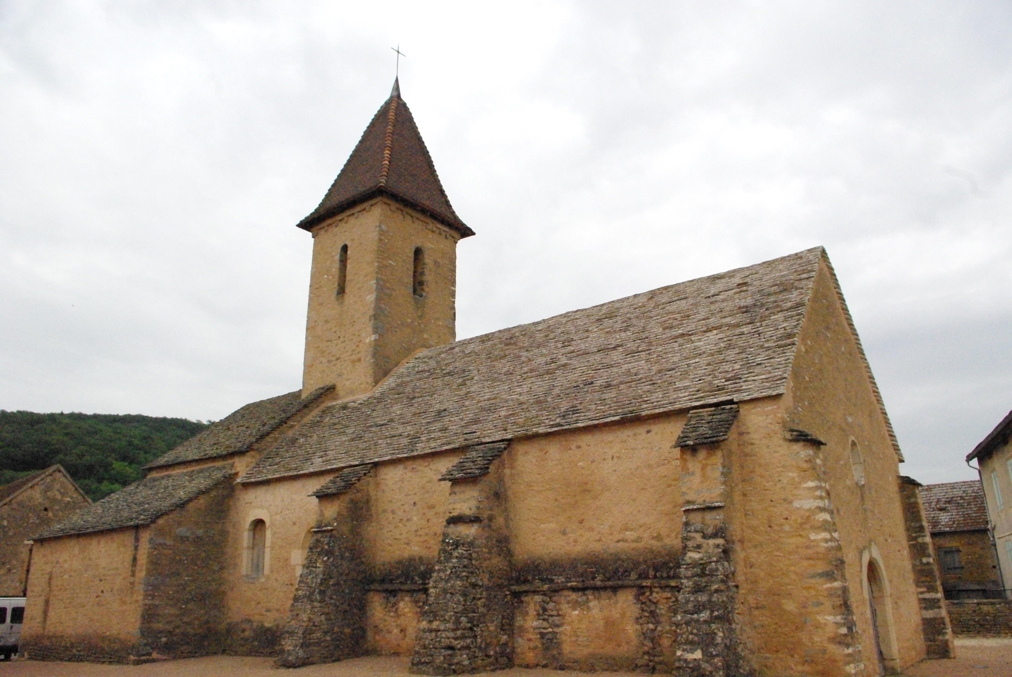 Église de Bray, Saône-et-Loire